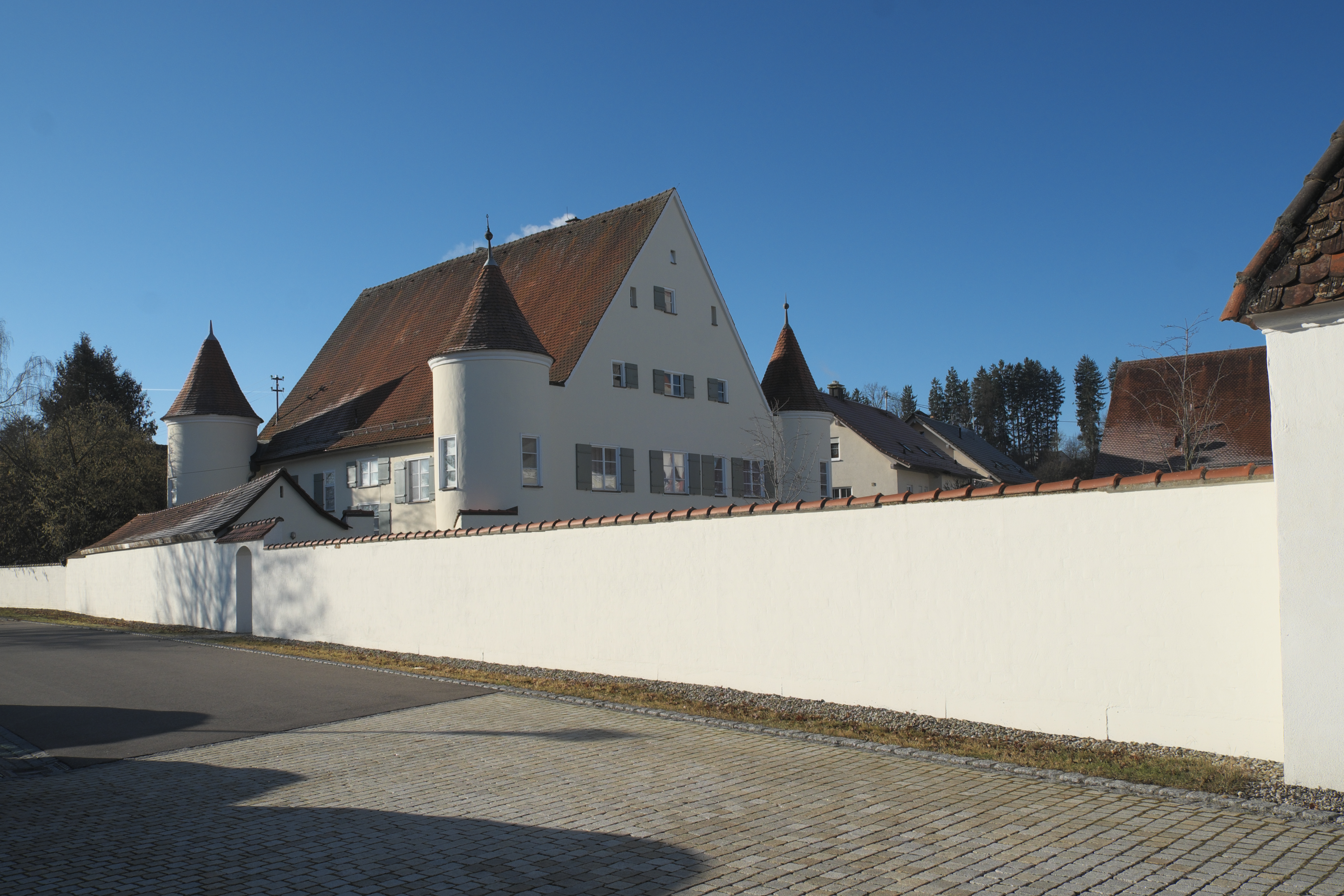 Pfarrhaus in Berkheim) im Landkreis Biberach (Baden-Württemberg/Deutschland)